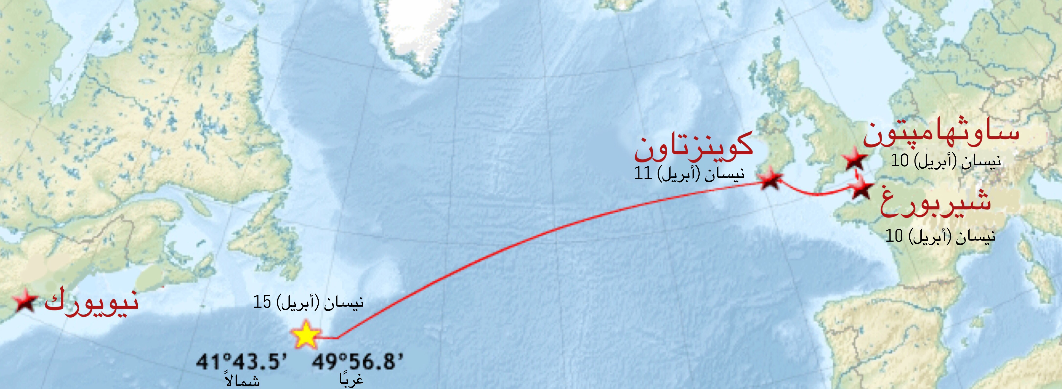 هذه خريطة لرحلة تايتانيك الأخيرة باللغة العربية.